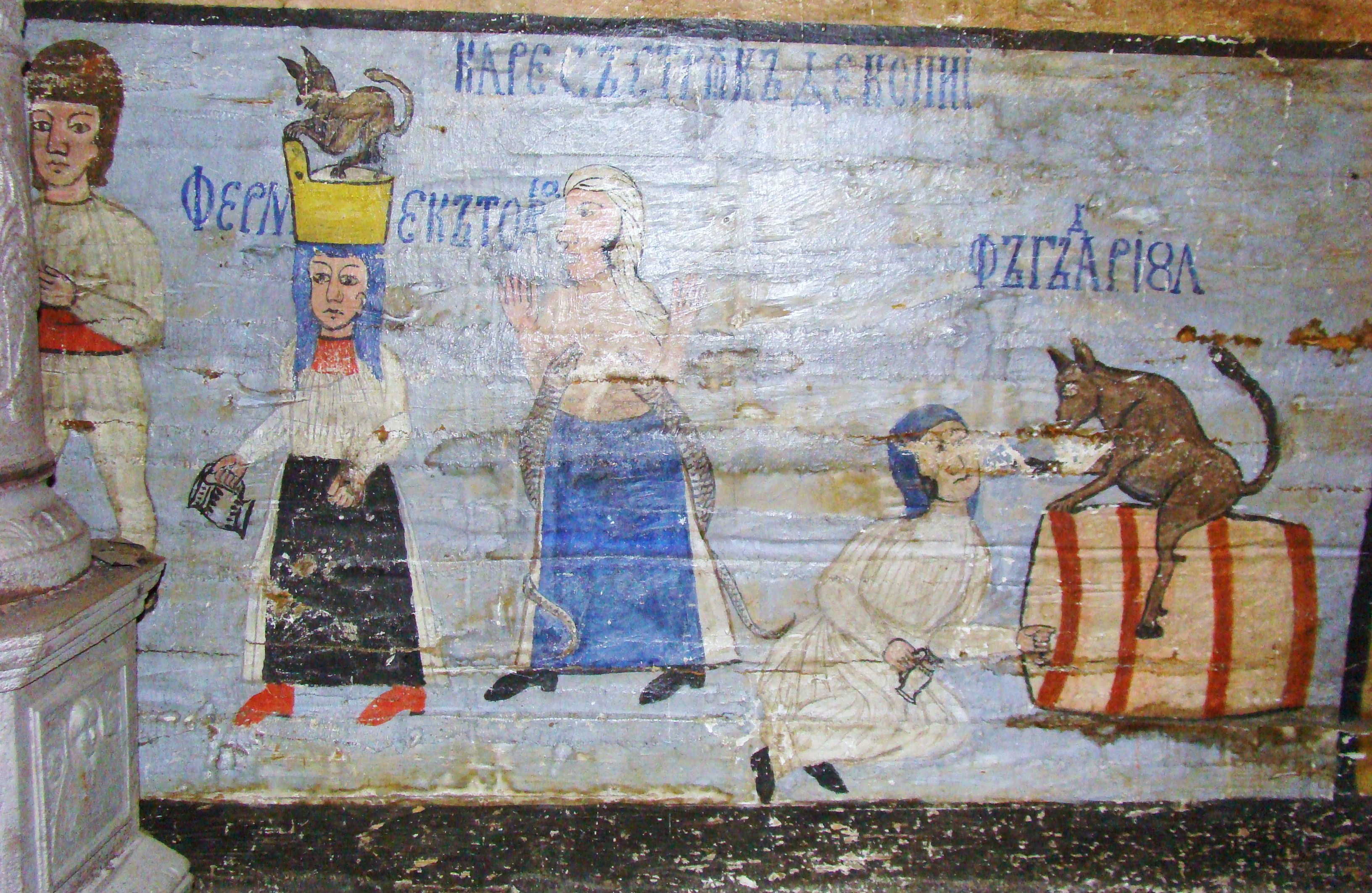 Biserica de lemn „Sfinții Arhangheli” din Ocolișel, județul Cluj